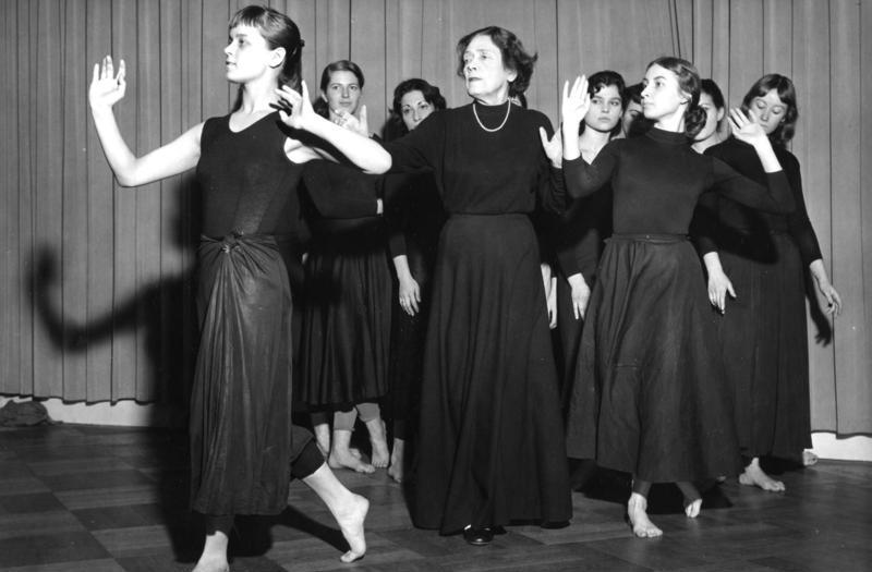 23.1.1959 West-Berlin, Mary Wigman-Studio Mitte: M. Wigman